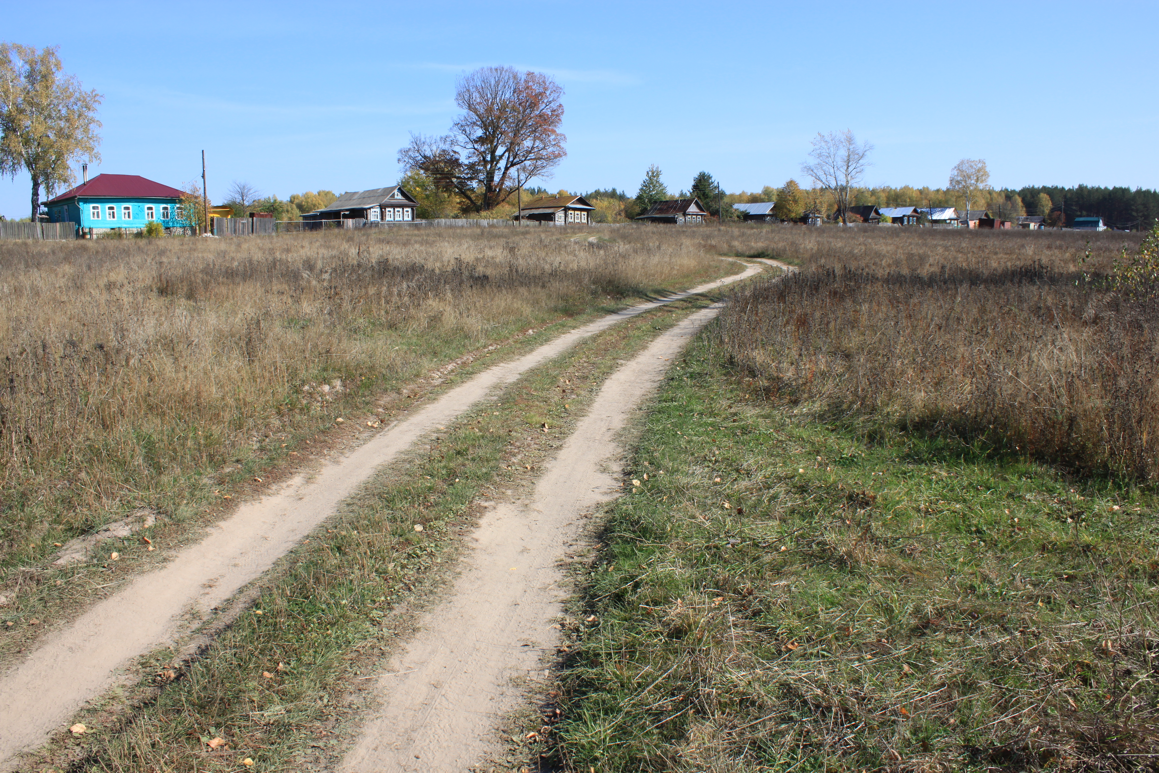 Буревестник Арзамасский район дорога